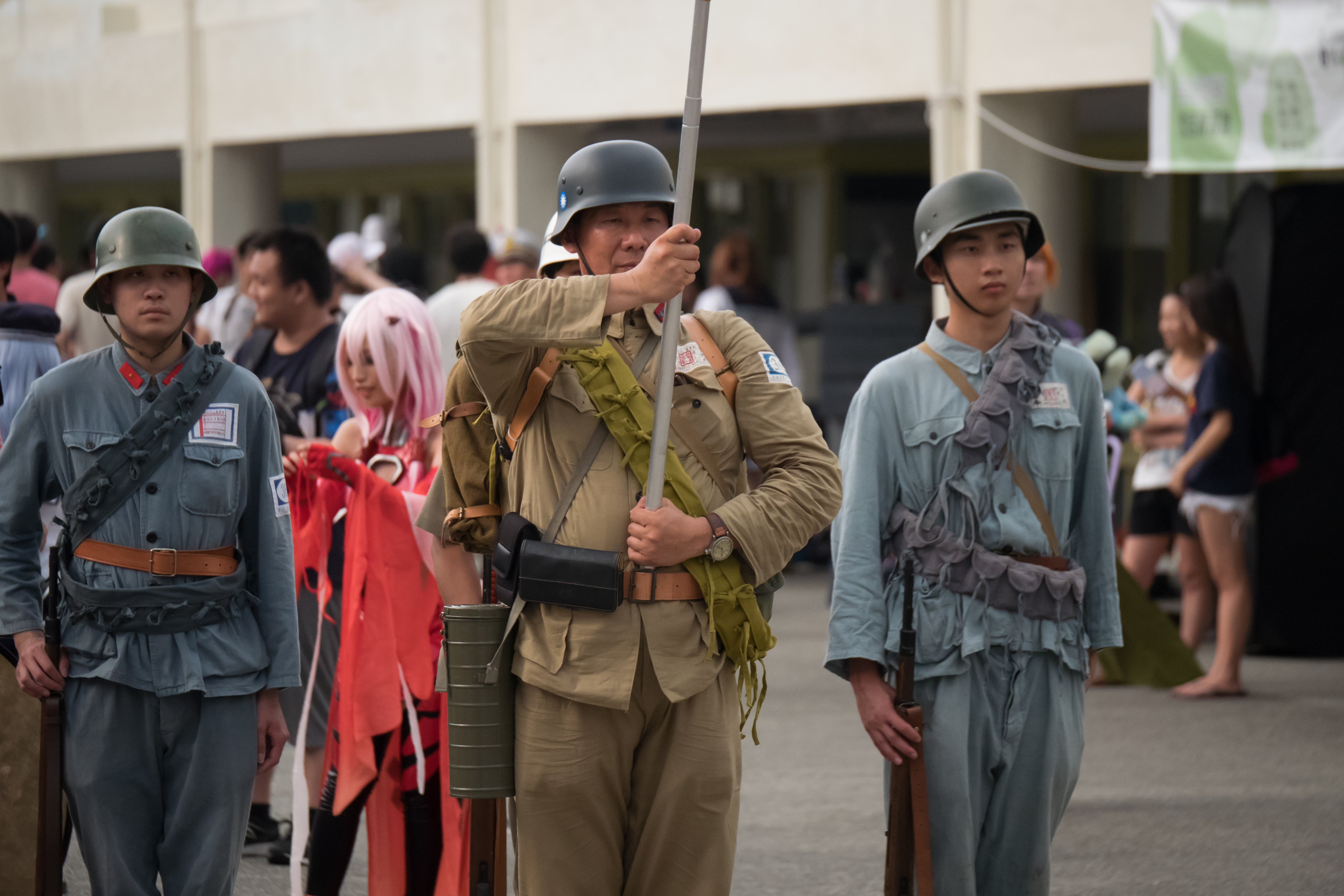 第24屆亞洲動漫創作展，國民革命軍cosplayer群。